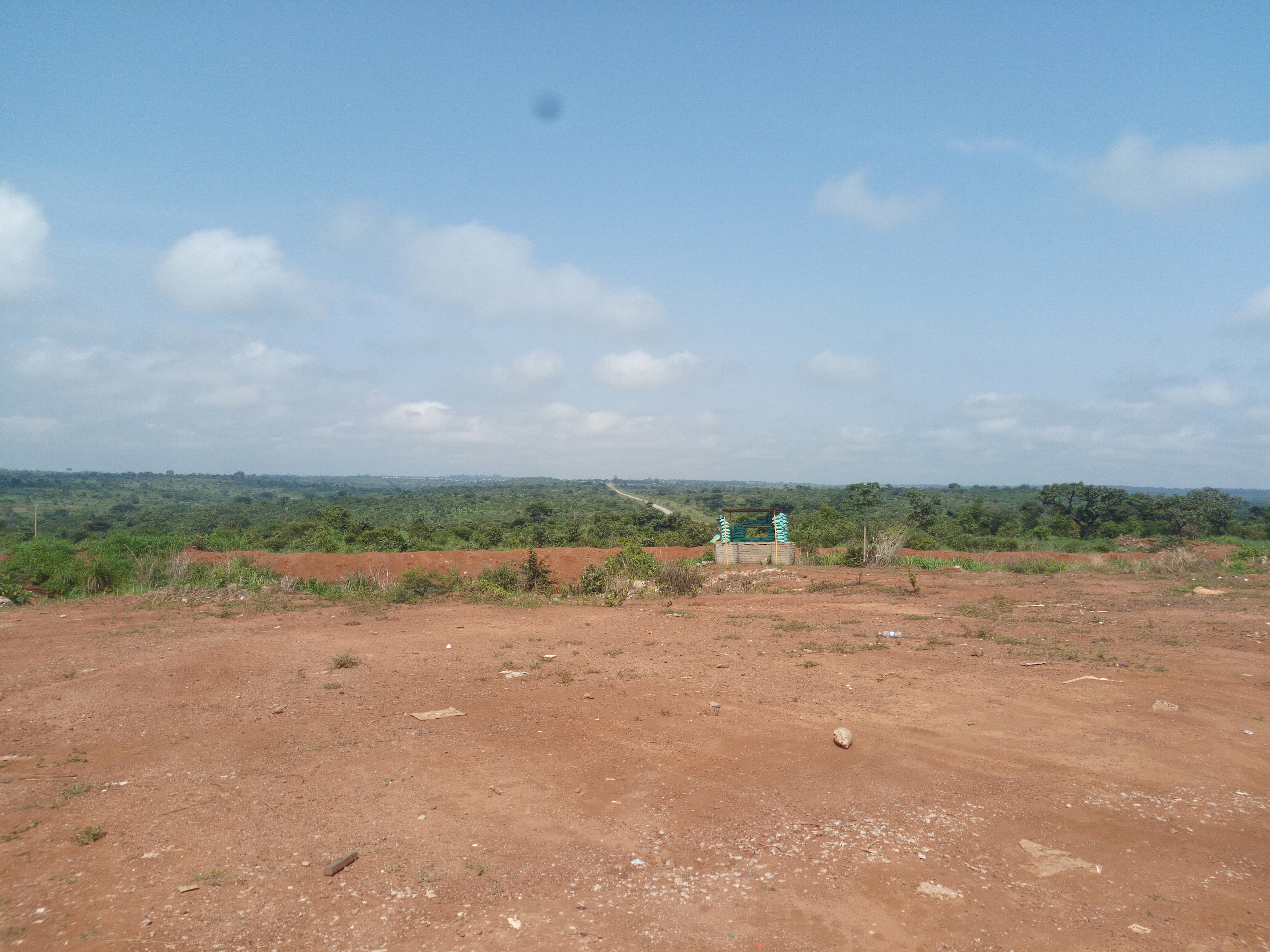 Poste de surveillance d'une base militaire des Nations Unies à Beloko, Centrafrique, située à quelques kilomètres de la frontière avec le Cameroun.